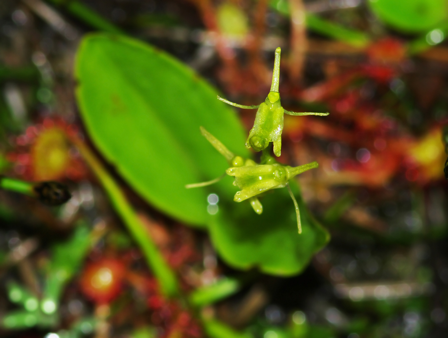 Lipiennik Loesela (Liparis loeselii) / Kuźnica Warężyńska w Dąbrowie Górniczej - wysięki